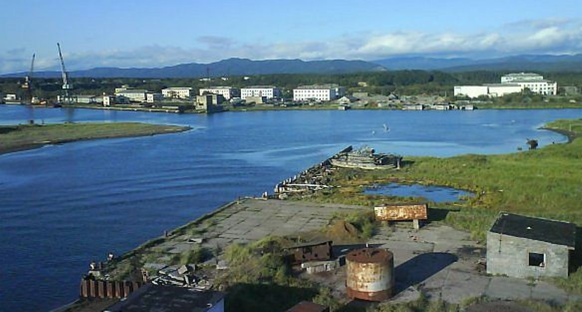 слева протока Рудановского, за песчанным мыском там же виднеется река Аинская, справа устье рек Чёрной и Красногорки.